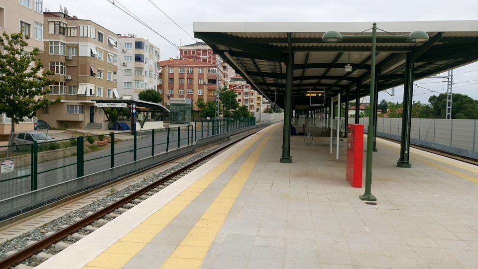 Kaynarca istasyonu.